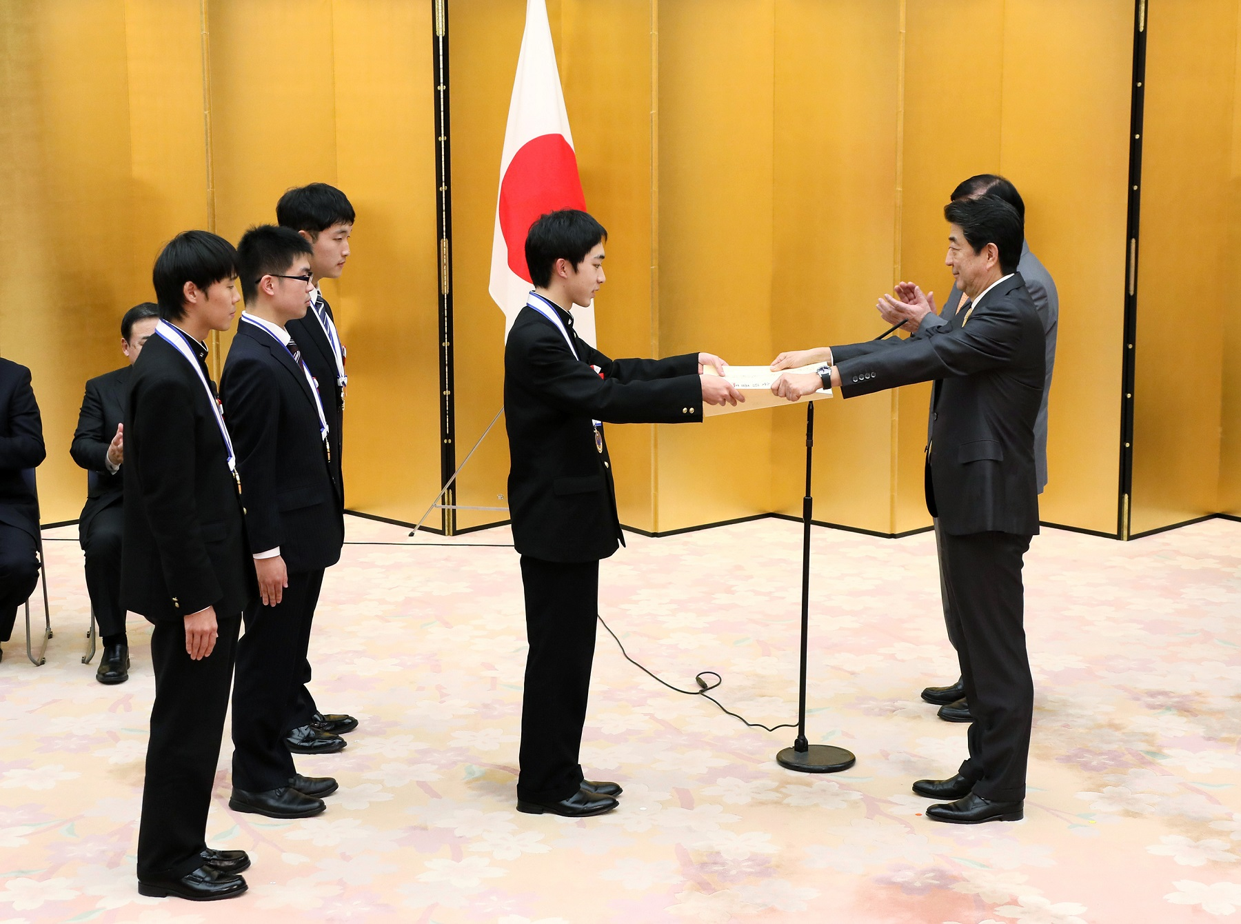 第8回ものづくり日本大賞（内閣総理大臣賞）の表彰式。 埼玉県立大宮工業高等学校ラジオ部。